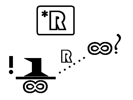 中文（台灣）: 「超實數域是實數域加上甚麼？」